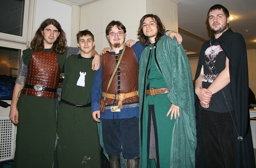 članovi udruge Ognjeni mač na SFeraKonu u Zagrebu